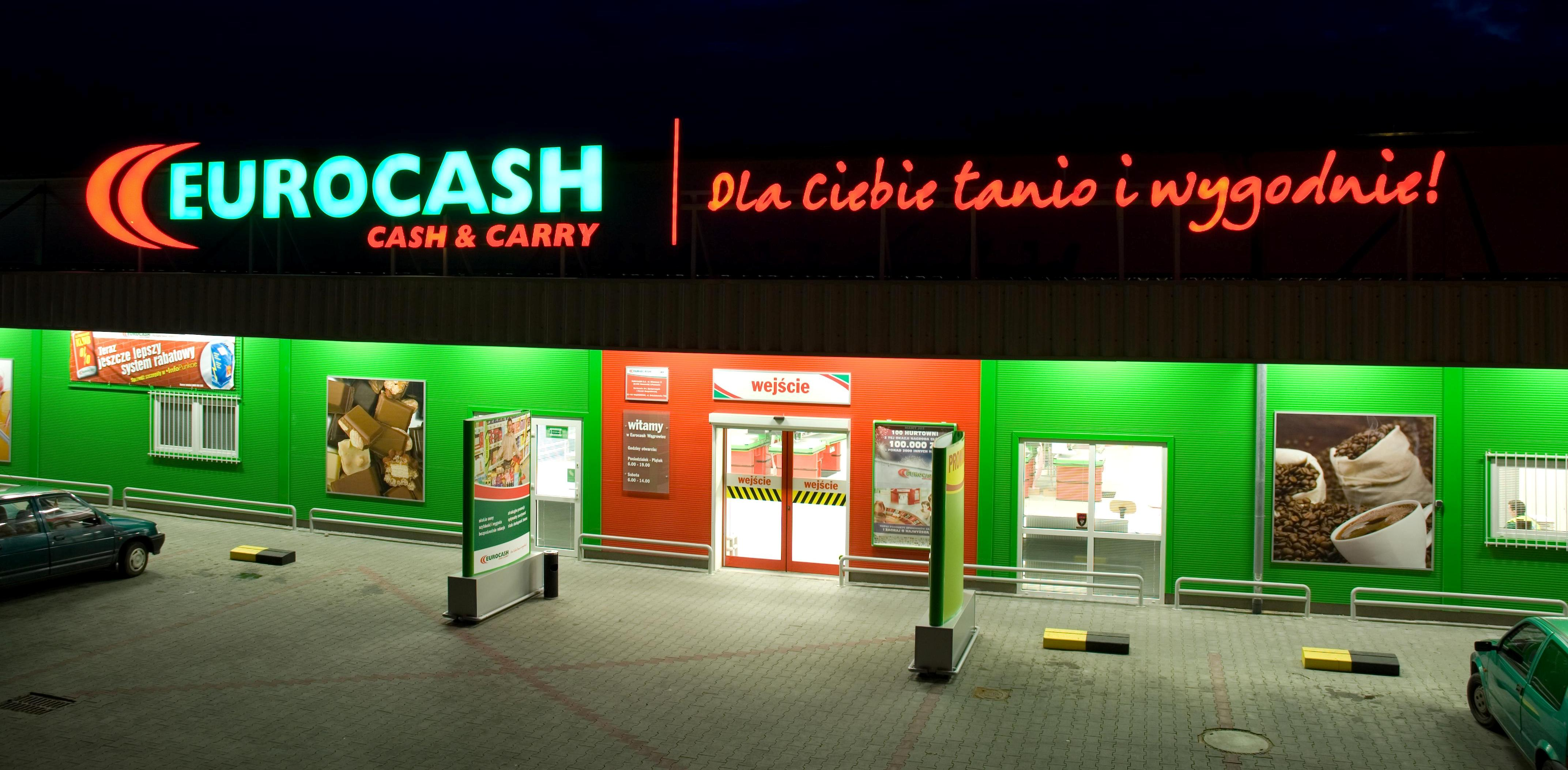 Hurtownia Eurocash Cash&Carry